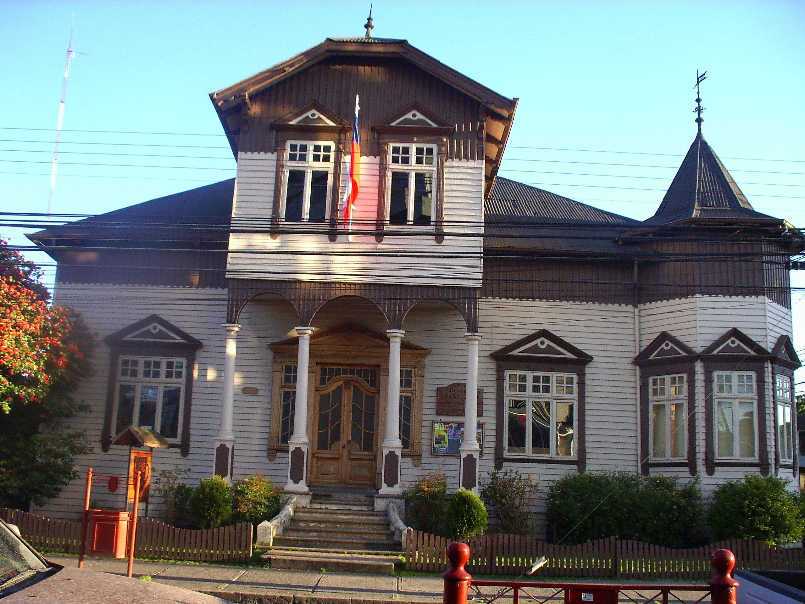 Casa de Enrique Schüller This is a photo of a national monument in Chile: 714